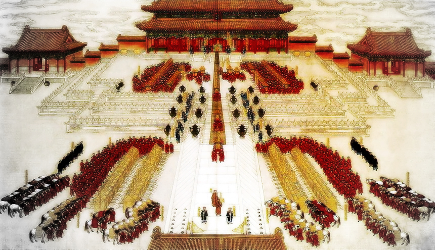 中文（中国大陆）: 《光绪皇帝大婚图》之一